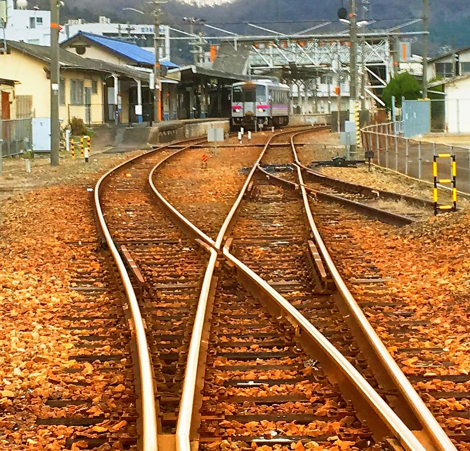 広島県のJR府中駅 駅の西側から撮影